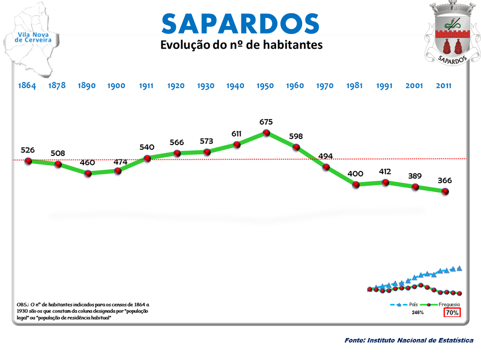 Censos 1864/2011